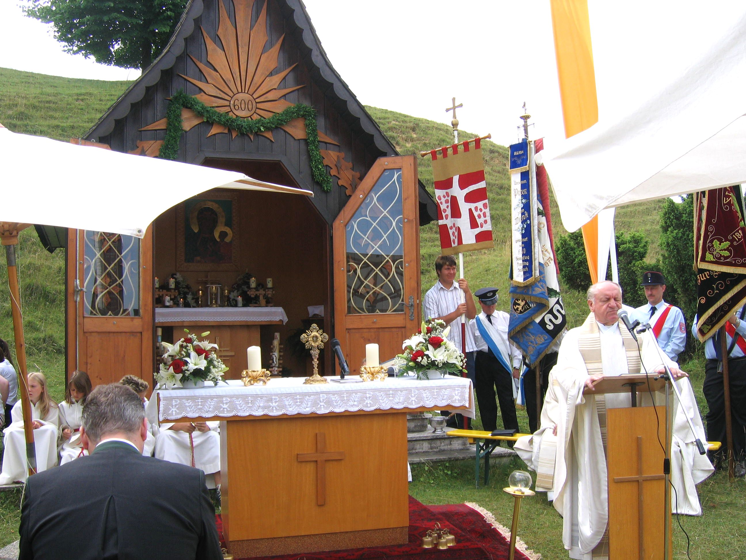 Kapellenjubiläum "Schwarze Madonna" mit Festprediger Stanislaus Krzyszkowski